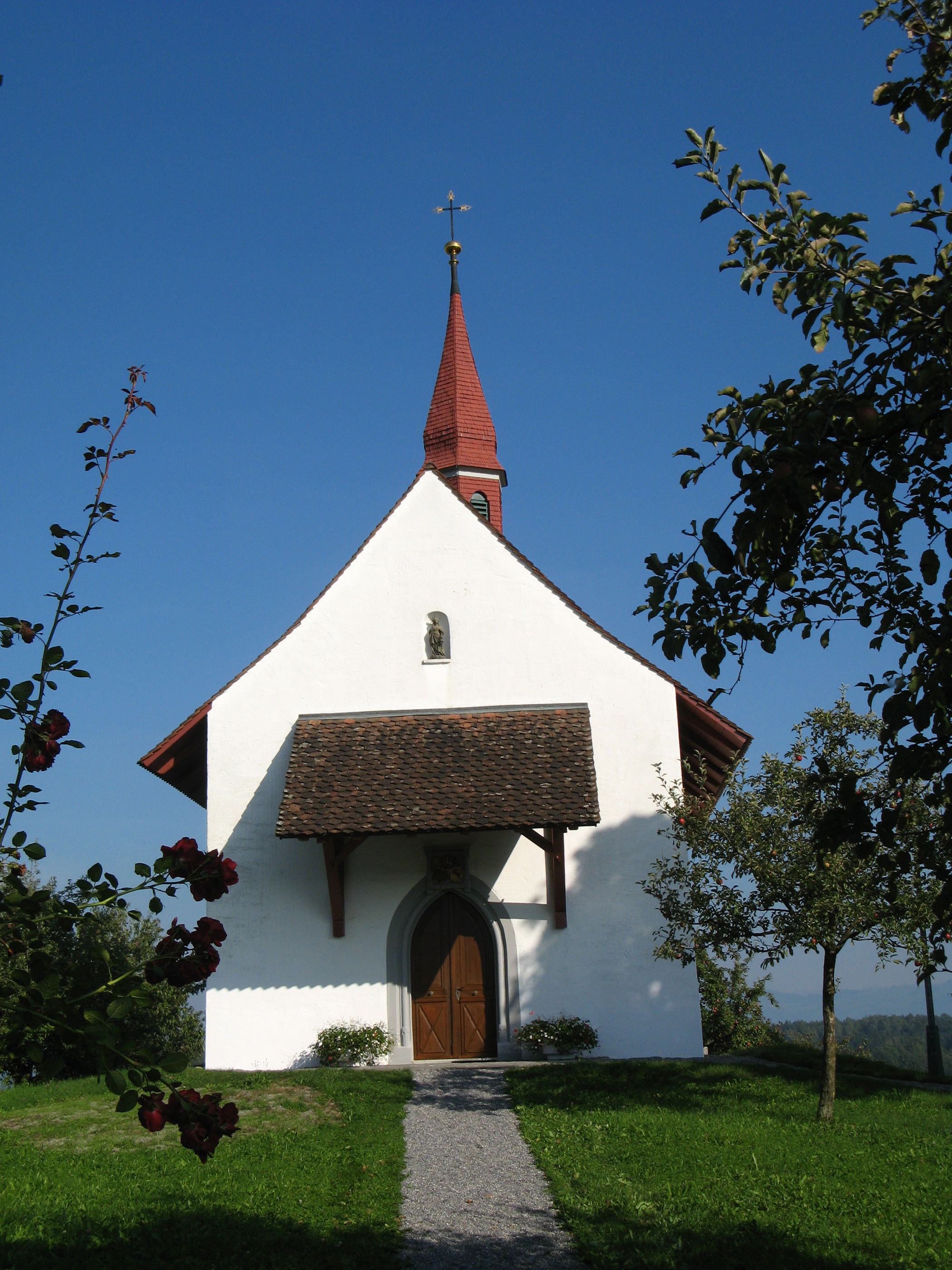 St. Verenakapelle in Aettenschwil bei Sins, Ansicht von vorne